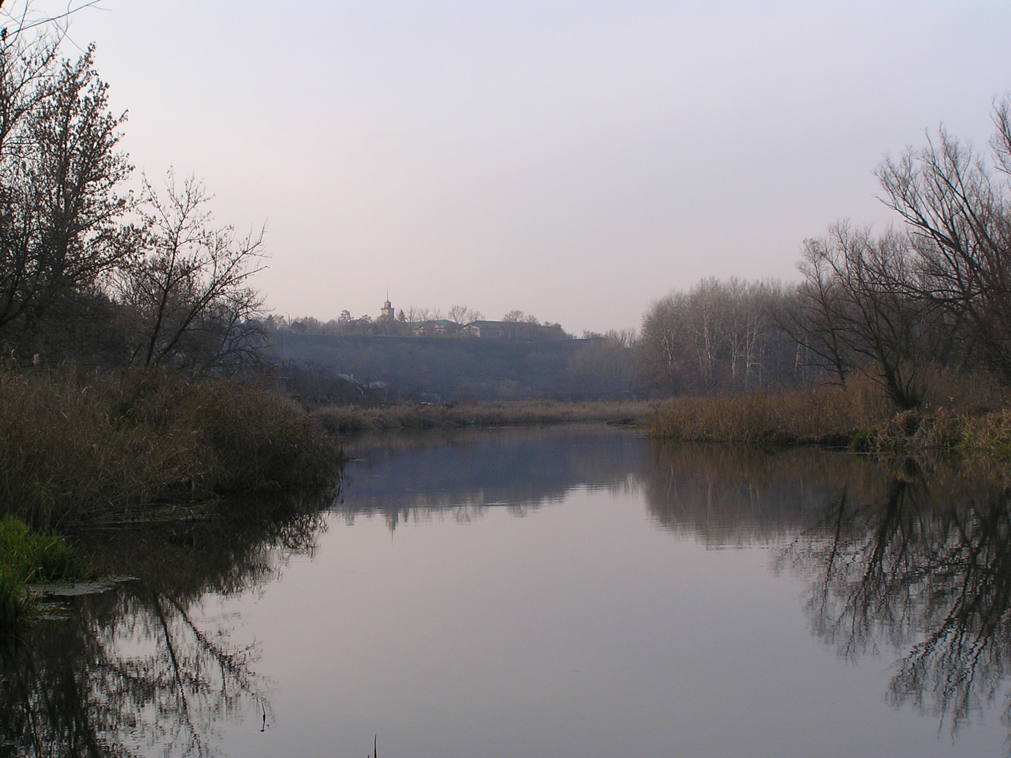 Вид на багатошарове Чугуївське городище (скіфського часу, роменської культури та давньоруського часу) з берега р.Сіверський Донець у м.Чугуїв Харківської обл.